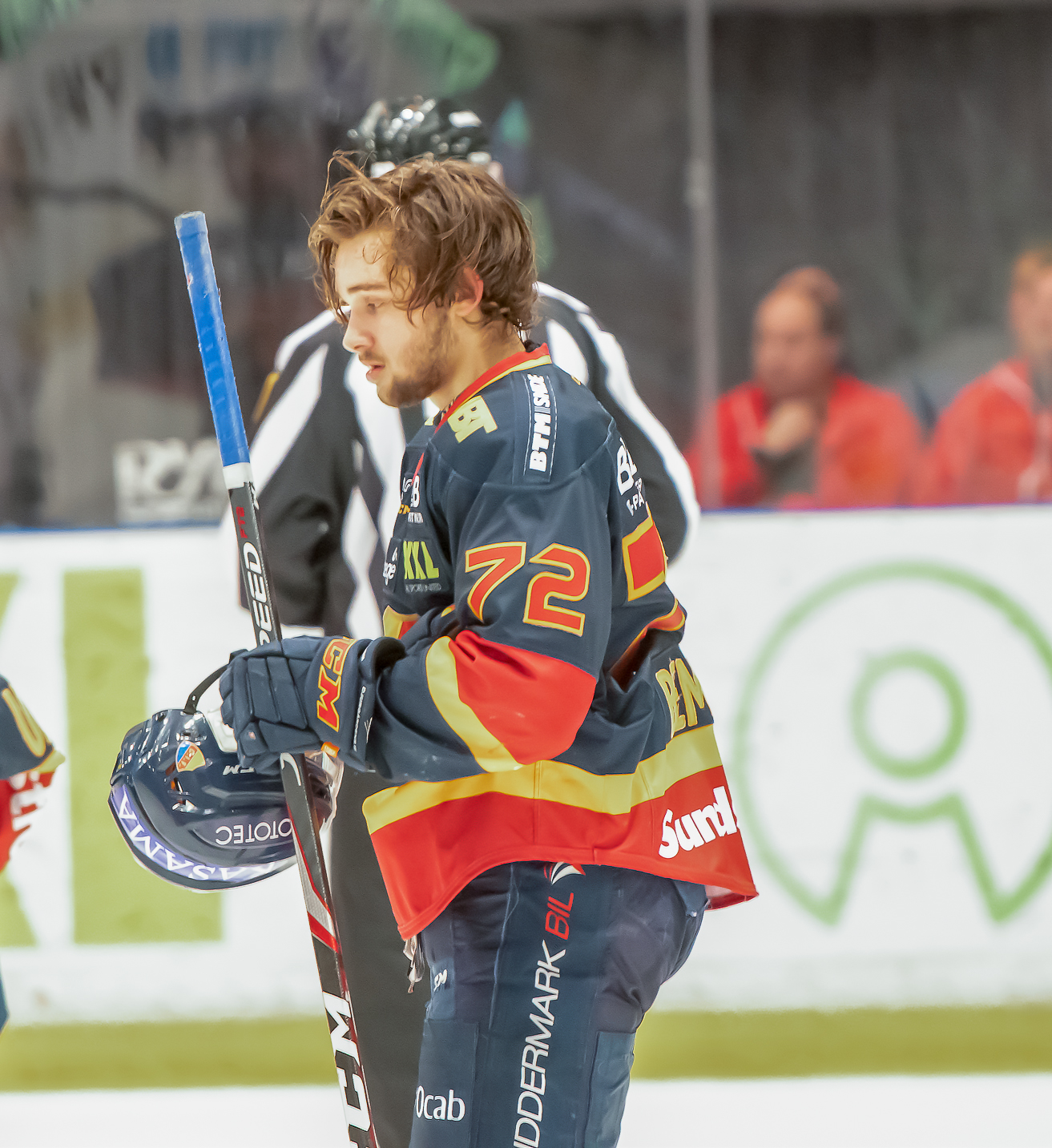 Djurgården-Färjestad 20190129